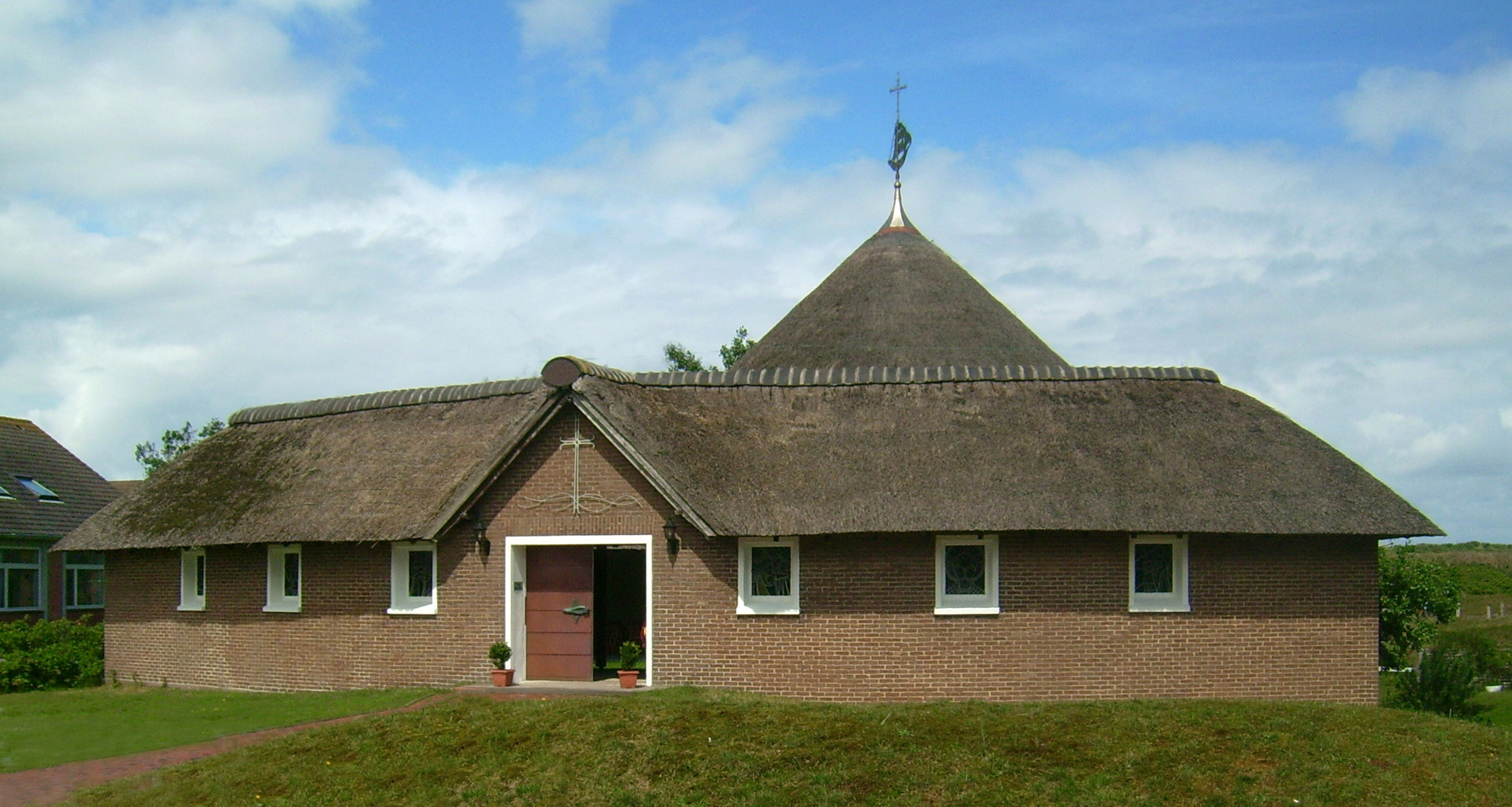 Neue katholische Kirche St. Nikolaus auf Baltrum (mit Reet gedeckt)